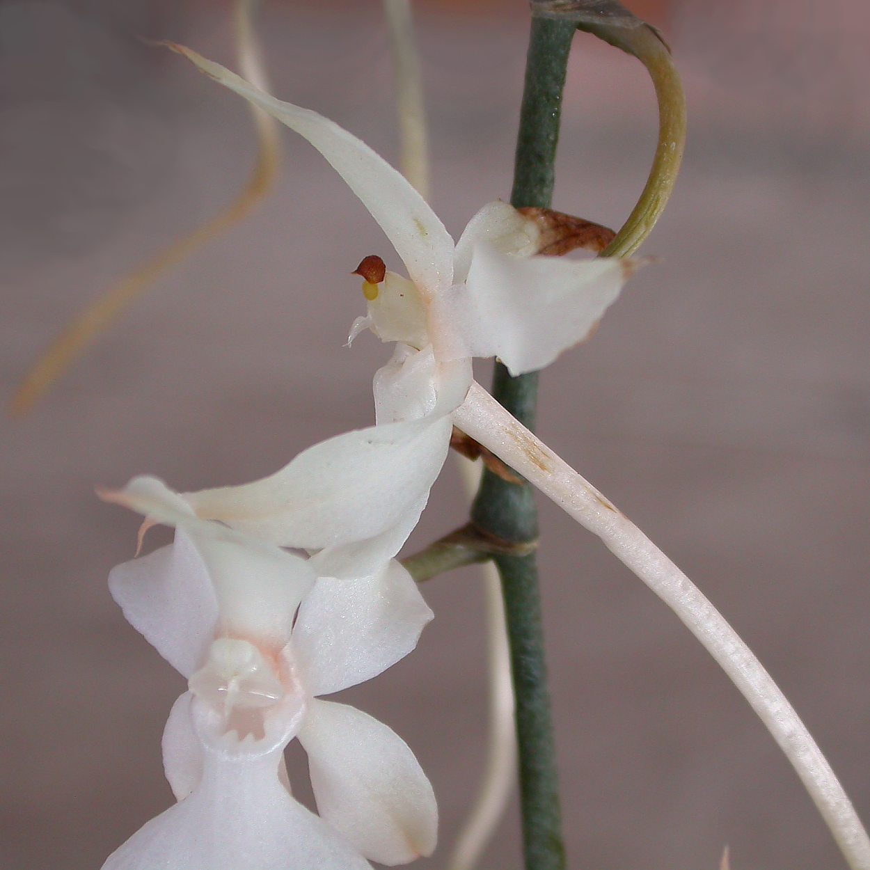 Foto tirada em 2002.